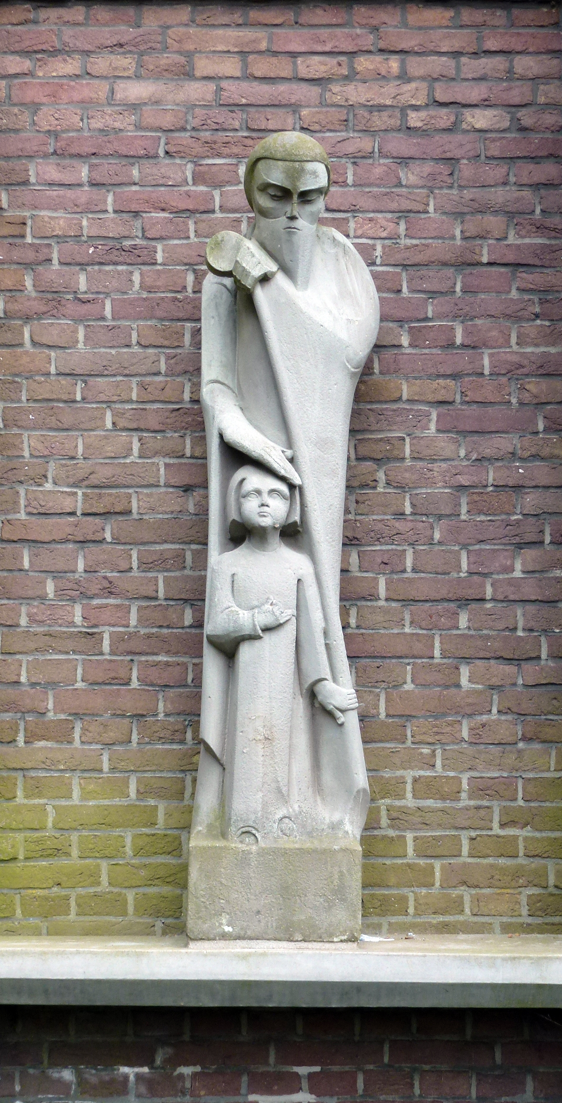 Sint-Victorkerk, Waddinxveen. Sculptuur Jozef met kind uit 1929 van Stef of Steph Uiterwaal. Een van de twee beelden voor de kerk. Ze stonden eerst in een nis aan de gevel van de Josephschool, later Kameleon, aan de Kanaalstraat in Waddinxveen. Bron:-Historische Genootschap Waddinxveen, kwartaalblad juni 2008, blz. 41, Twee beelden, afkomstig uit de Josephschool, geplaatst bij de St. Victorkerk